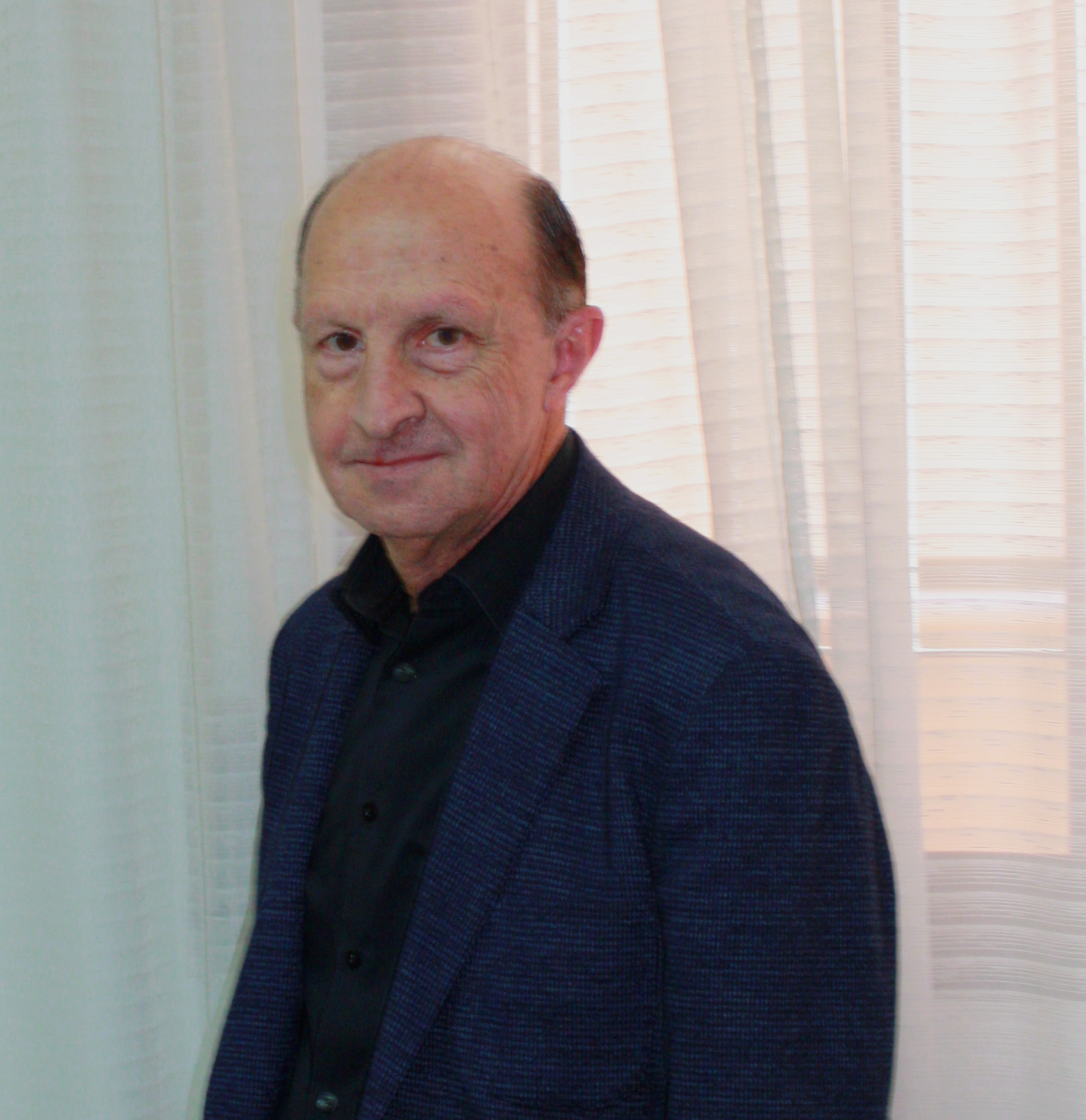 Profesor José Gabriel López Antuñano en 2018